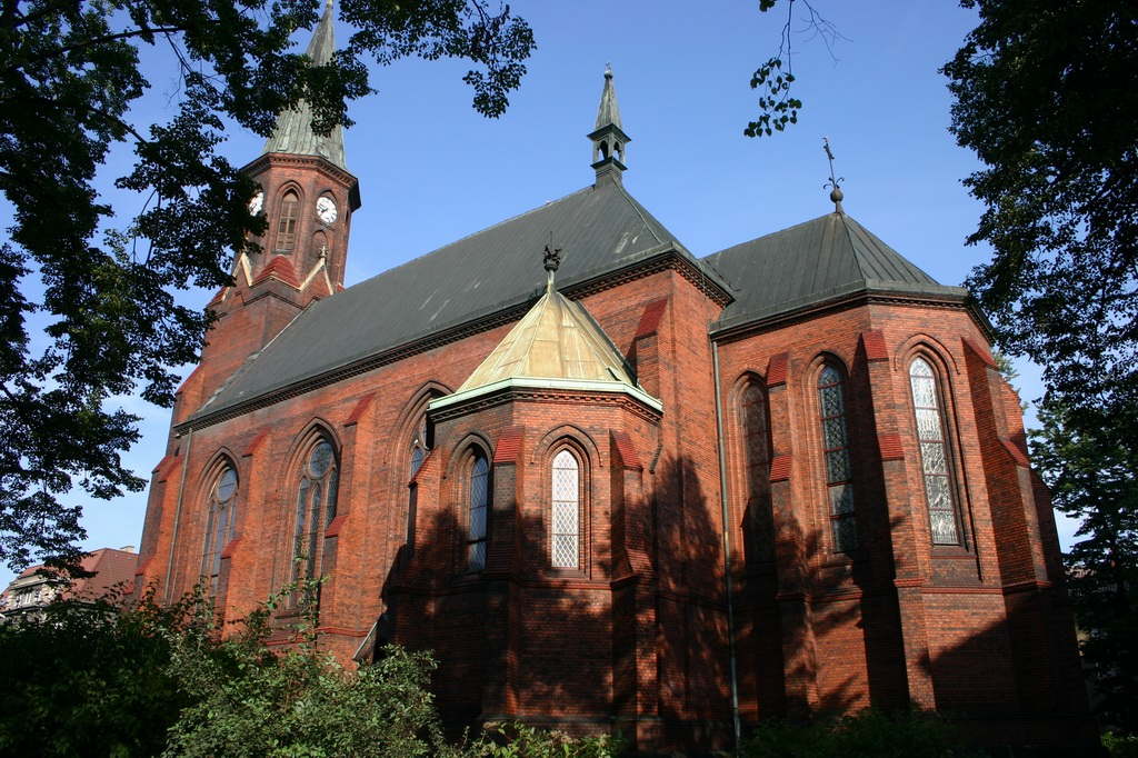 Římsko-katolický kostel v Bohumíně